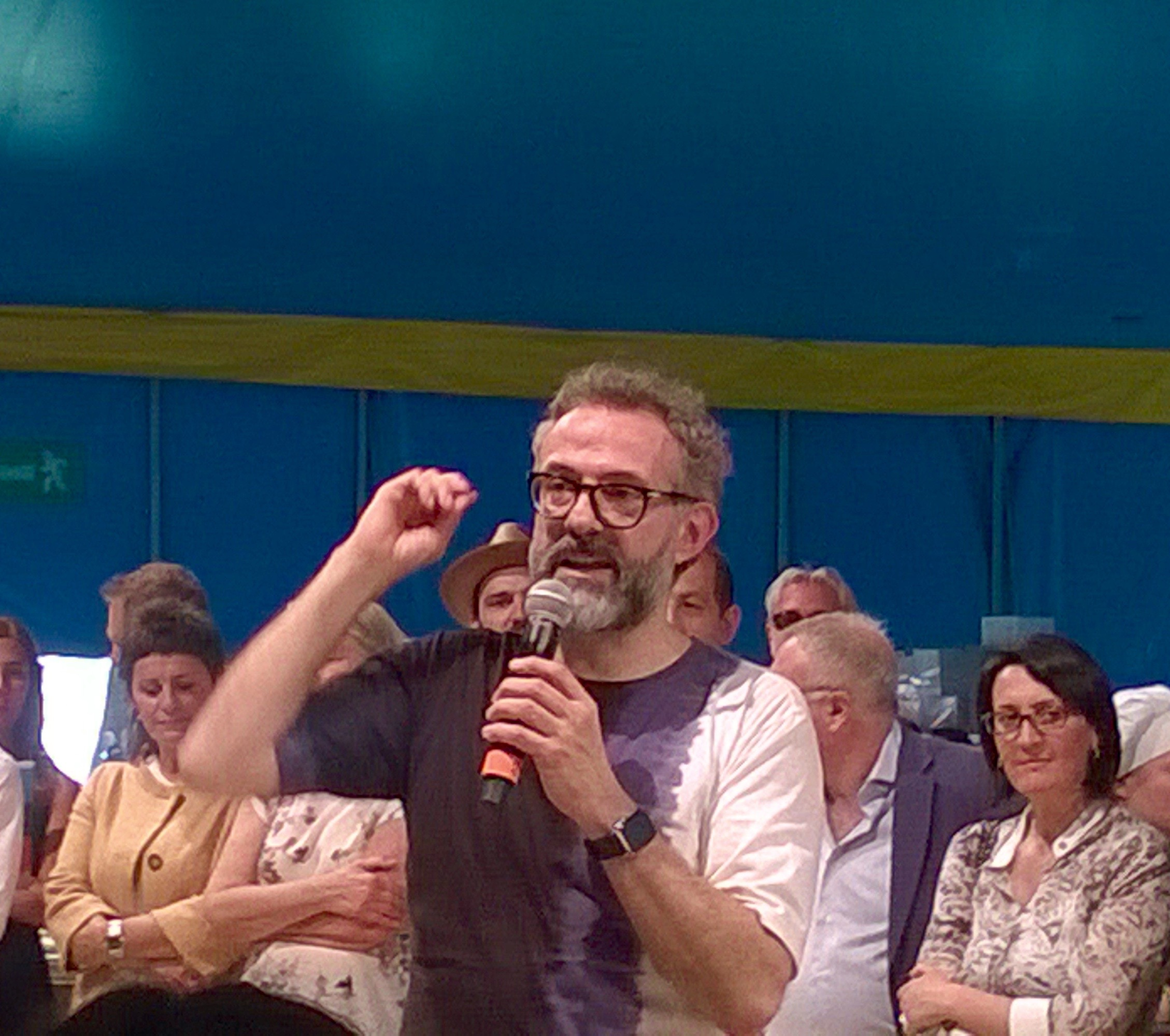 Massimo Bottura a Rimini sabato 20 giugno 2015